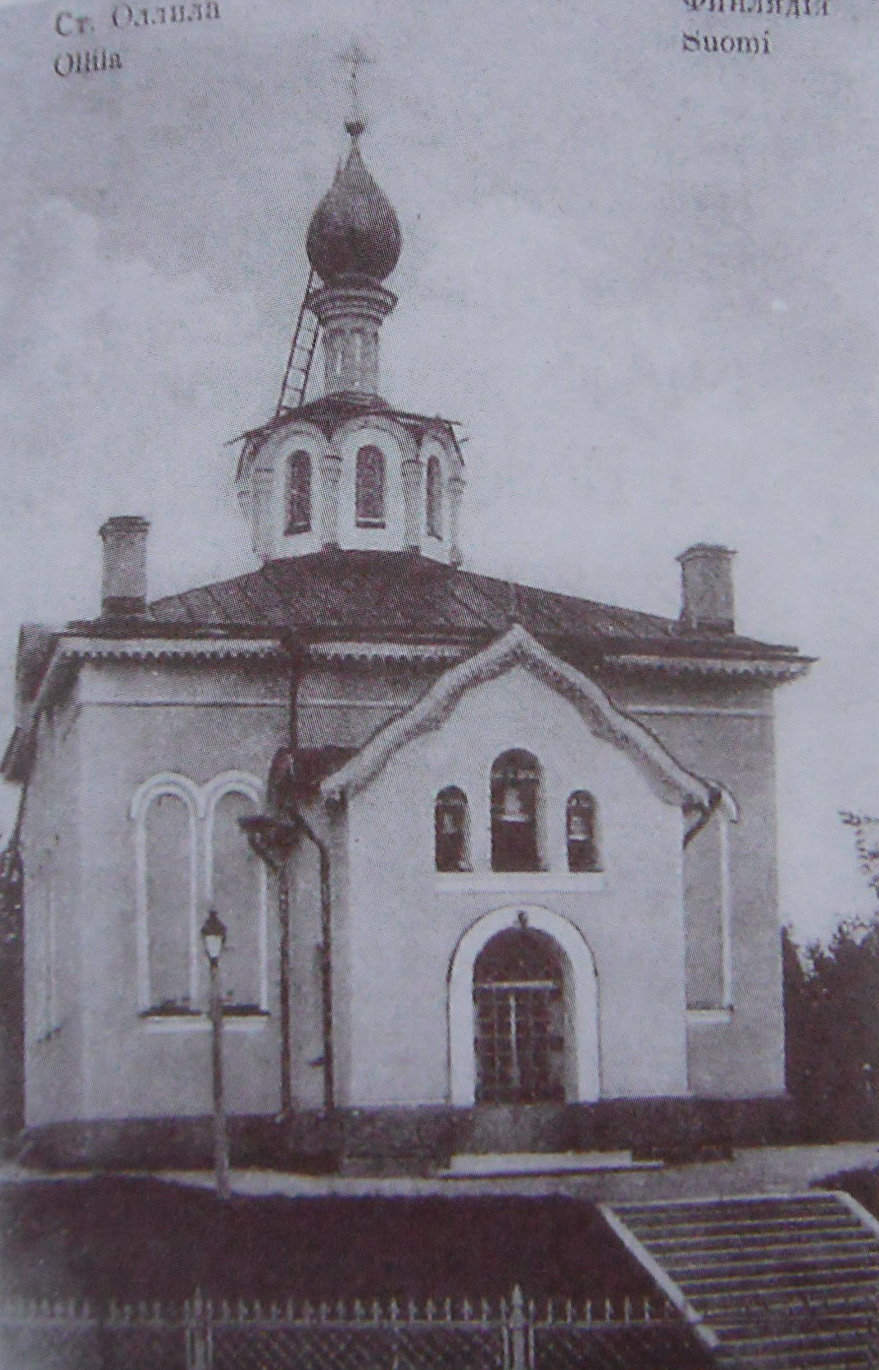 Церковь которая была в п.Оллила Финляндии (под Петербургом ныне п.Солнечное) православная Смоленской иконы Божией Матери